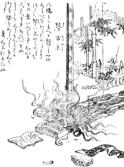 Kotofurunushi (琴古主) from the Gazu Hyakki Tsurezure Bukuro (百器徒然袋)